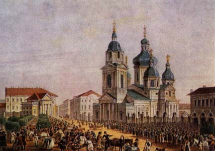 Храм Спаса на Сенной, Санкт-Петербург. Акварель К. Беггрова по литографии А. Брюллова.